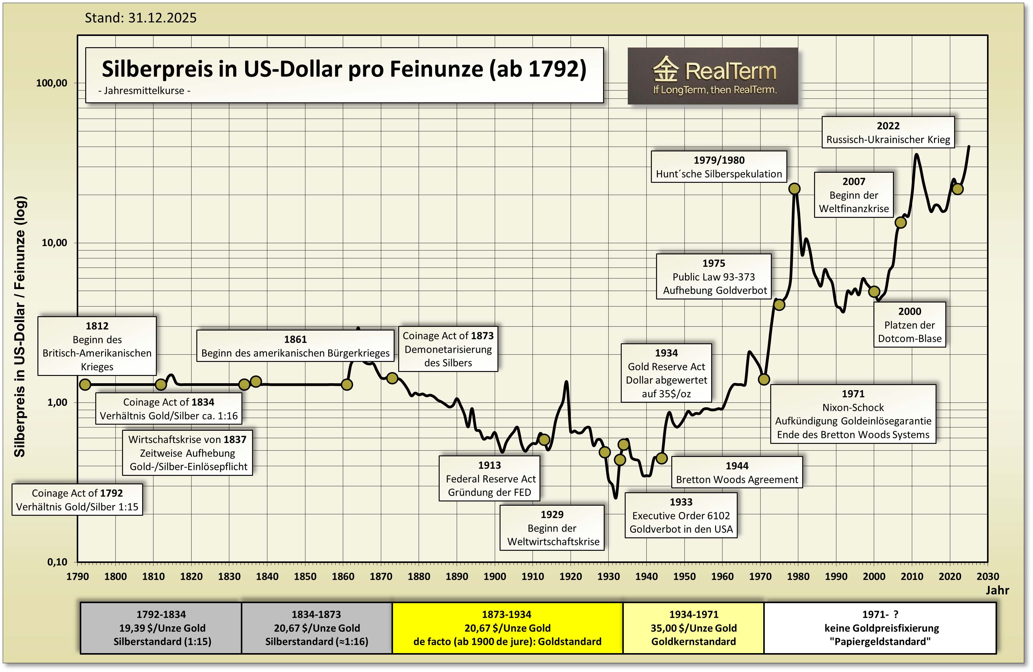 Historischer Silberpreis in US-Dollar (US$) ab1792